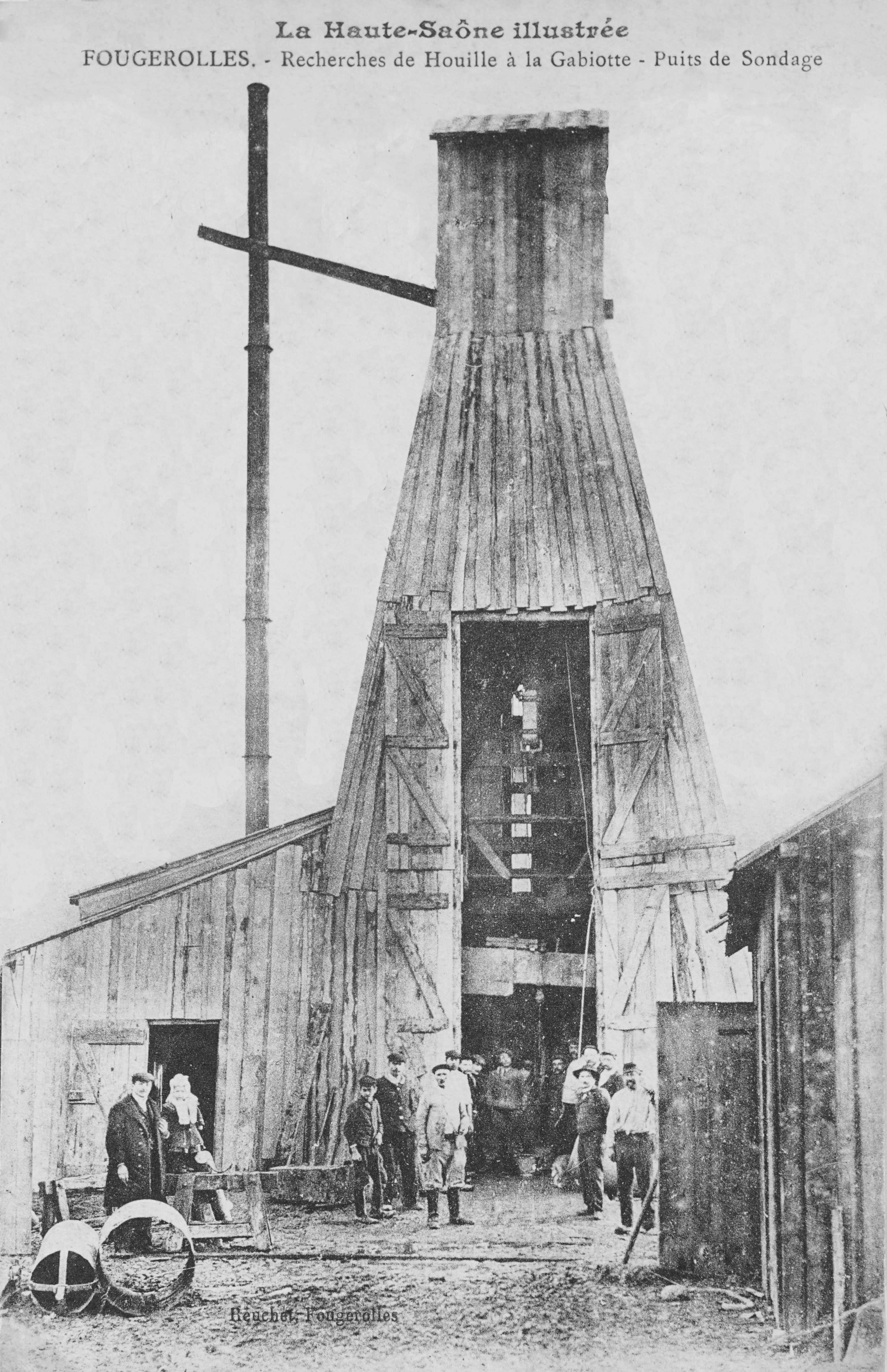 Sondage entrepris à La Gabiotte (Fougerolles, France) pour la recherche de la houille.